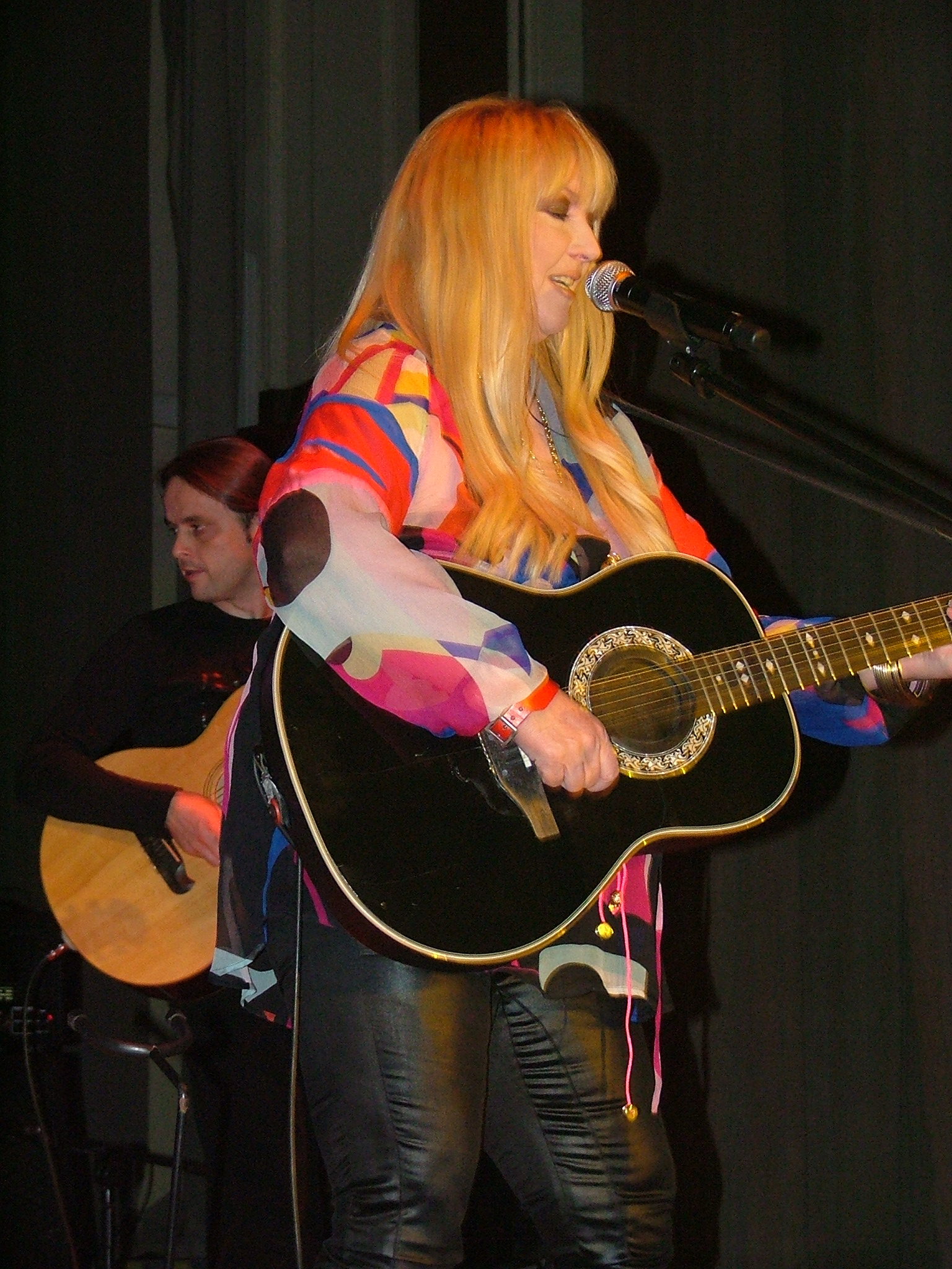 Centralne Obchody Święta Kolejarza 2007, Warszawa, Sala Kongresowa Maryla Rodowicz